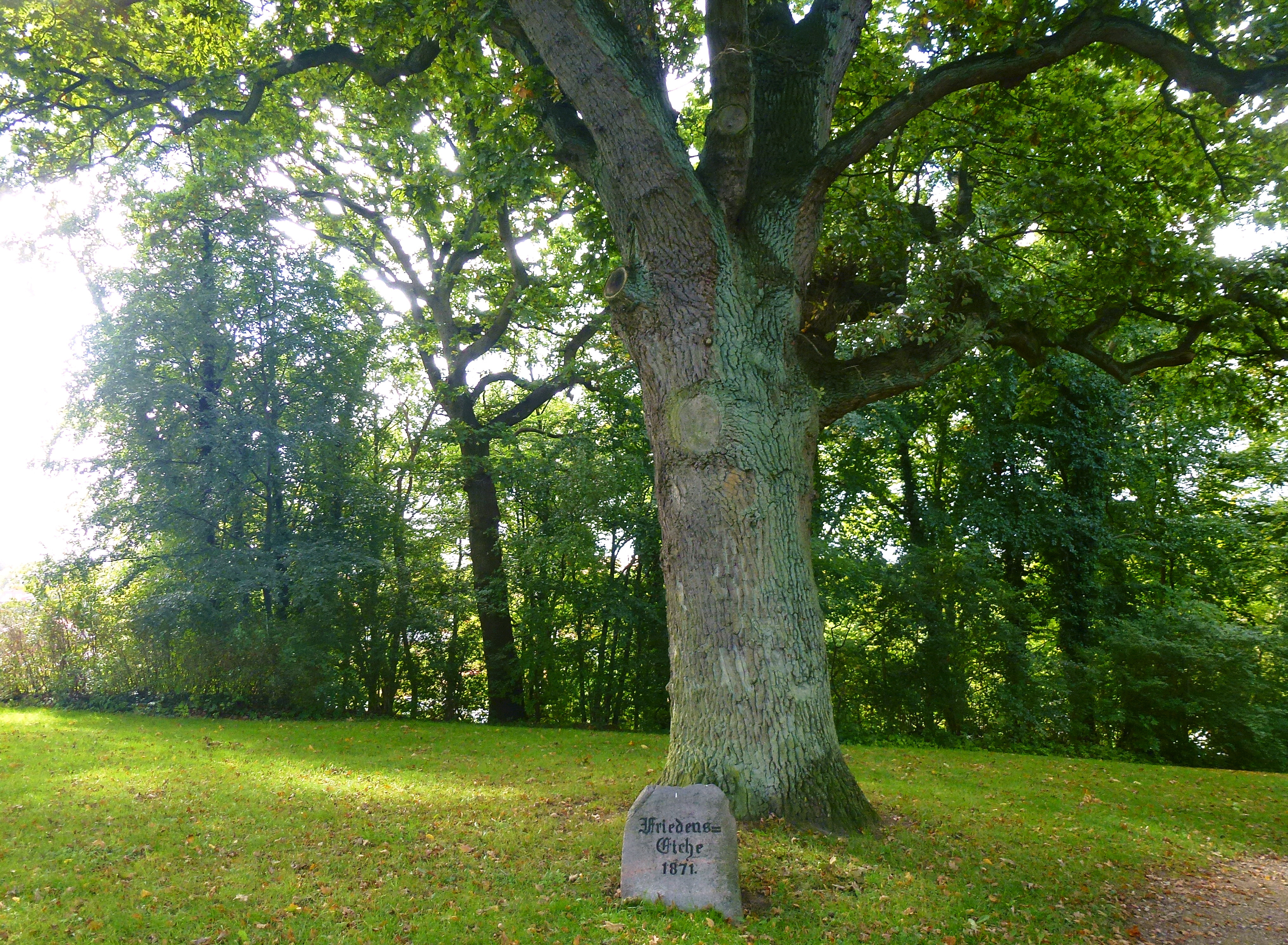 Die Friedenseiche beim Bismarckturm in Lütjenburg